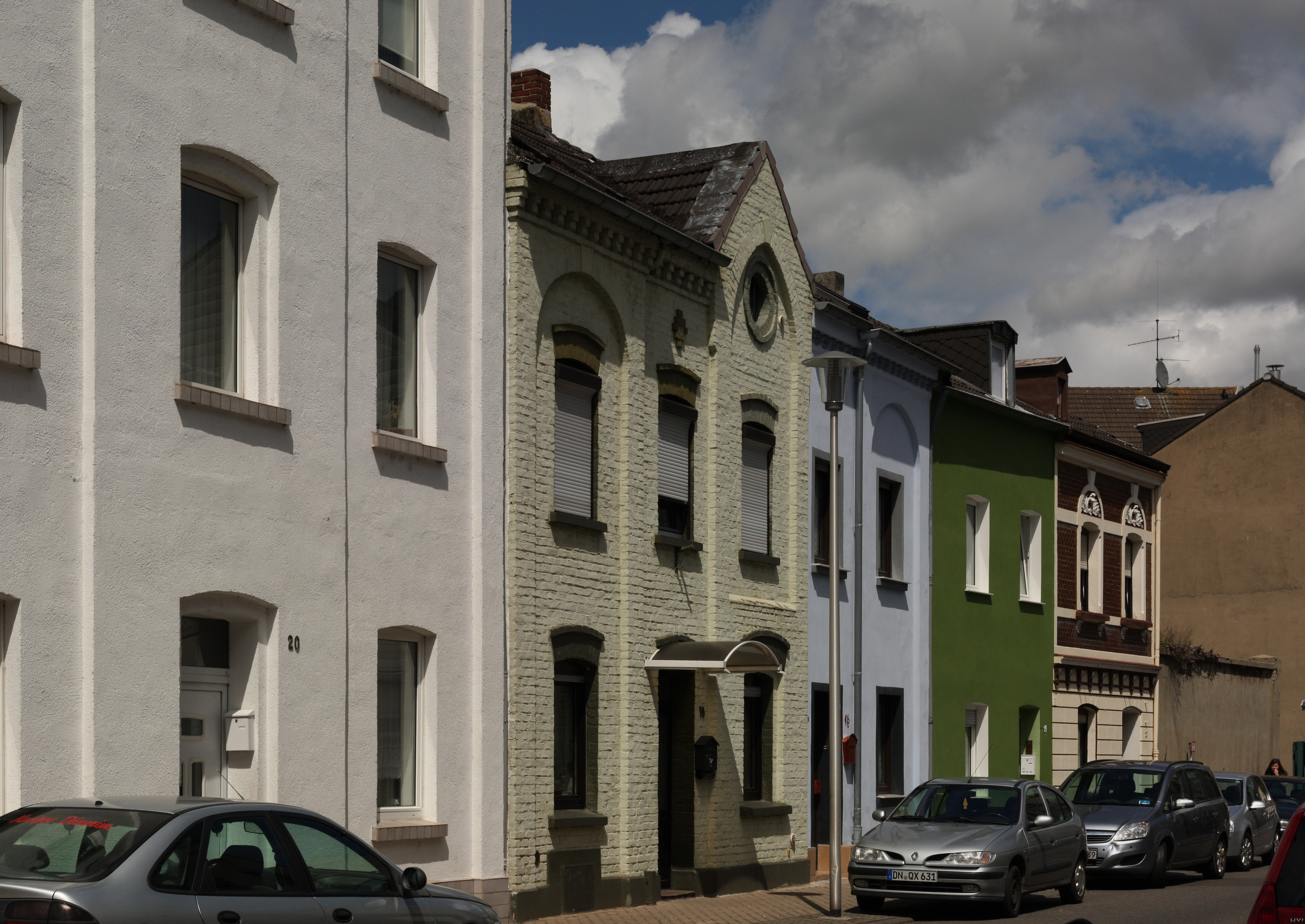 Die Johanniterstraße in Düren mit Sicht nach Nordosten. Aus mehreren Einzelbildern mit Hugin zusammengesetztes Bild.